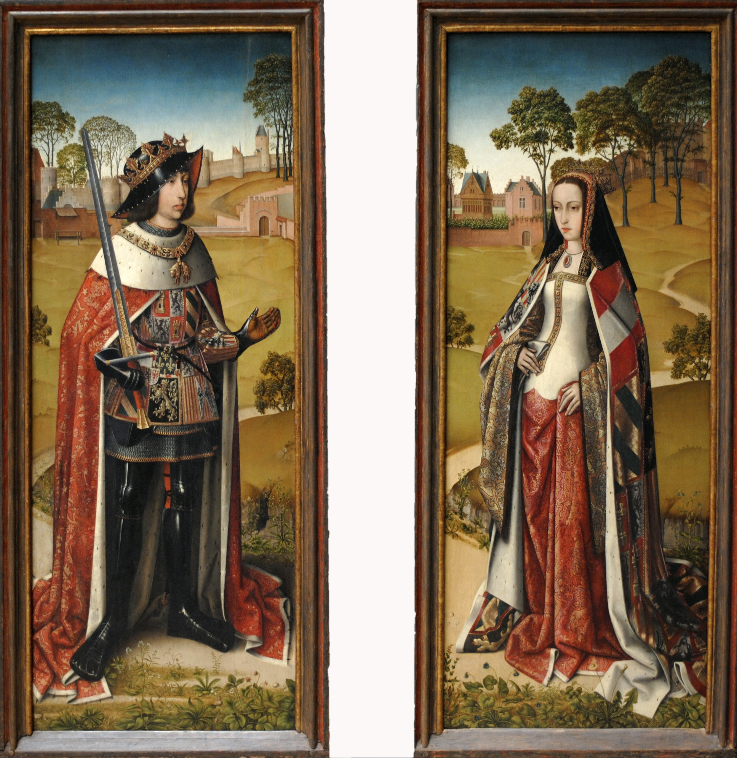 Volets du triptyque de Zierikzee.Volet de gauche : portrait de Philippe le beau. Volet de droite : portrait de jeanne la folle.